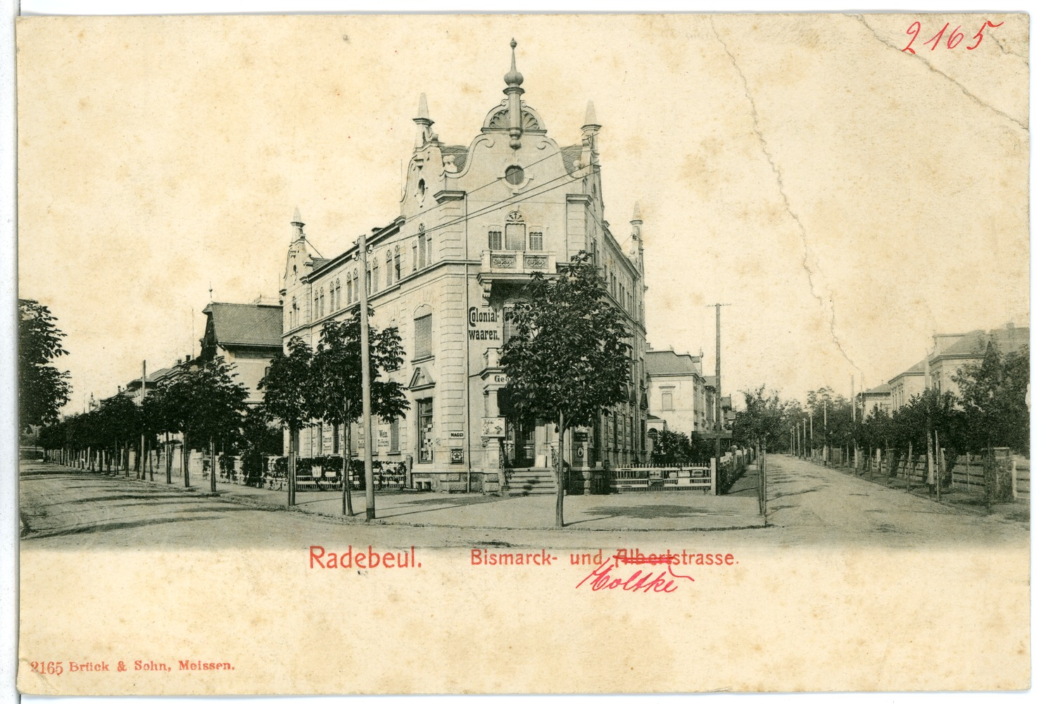 Radebeul; Bismarkstraße This postcard is from publisher Brück & Sohn in Meißen ( postcard has a unique number 02165 and is available in a higher resolution at the publisher. This images was uploaded in a cooperation project between Wikipedians and the publisher.